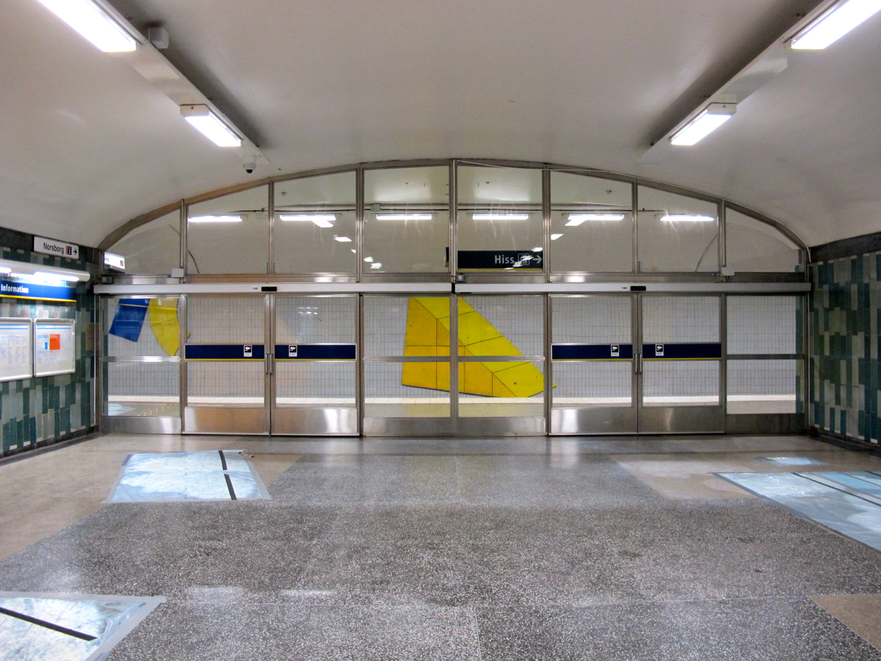 Aspuddens tunnelbanestation, område mellan perrongerna, 2014